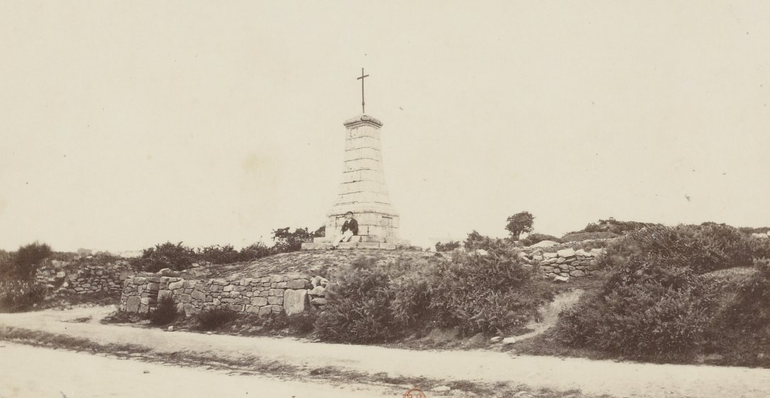 monument expiatoire, rue de la Perrière à Lorient, en 1866, quartier de Kergroise Lorient en 1866, quartier de Kergroise